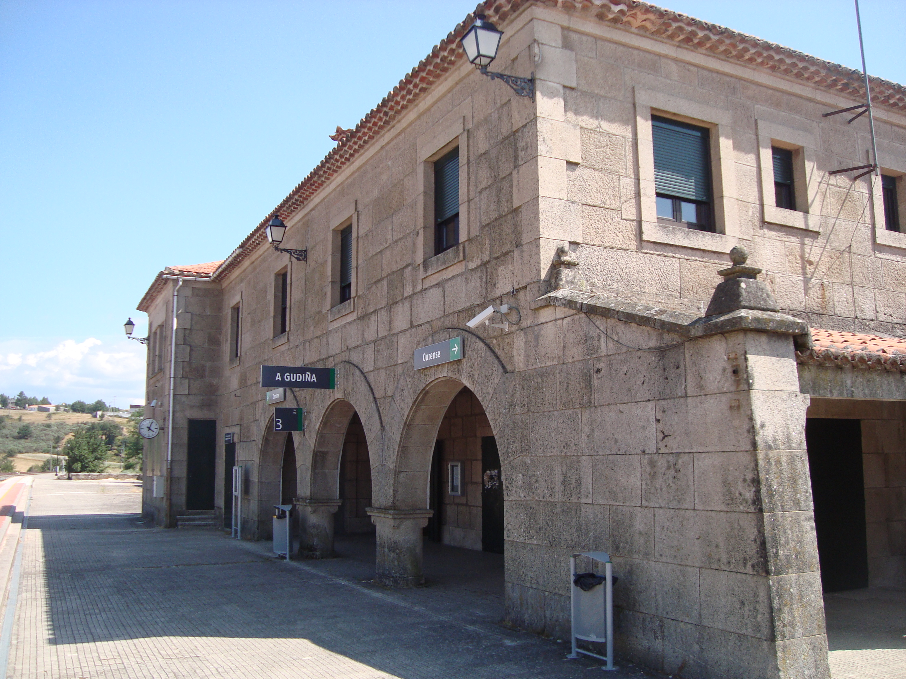 Estación de A Gudiña.